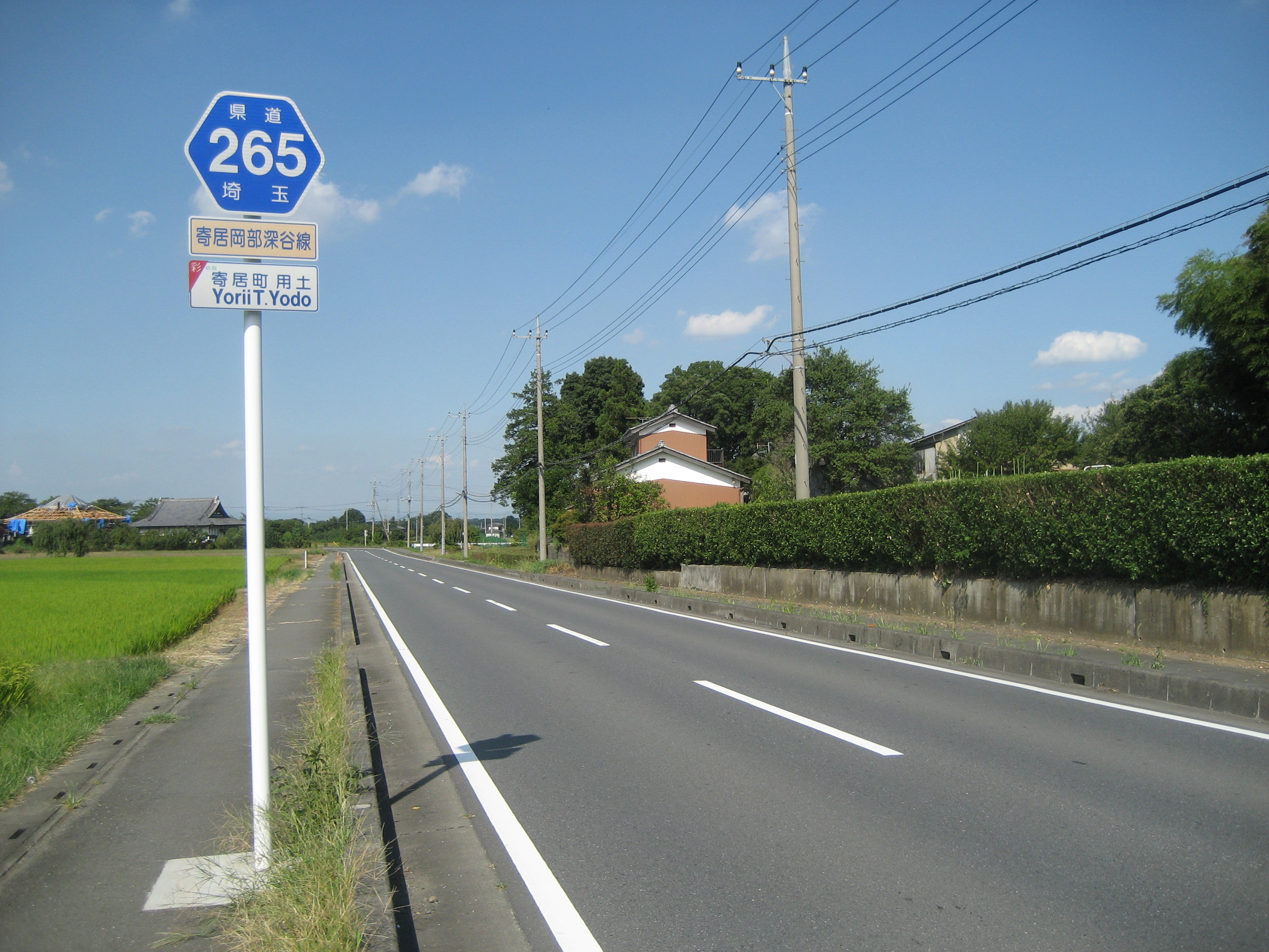 埼玉県道265号線寄居町用土付近